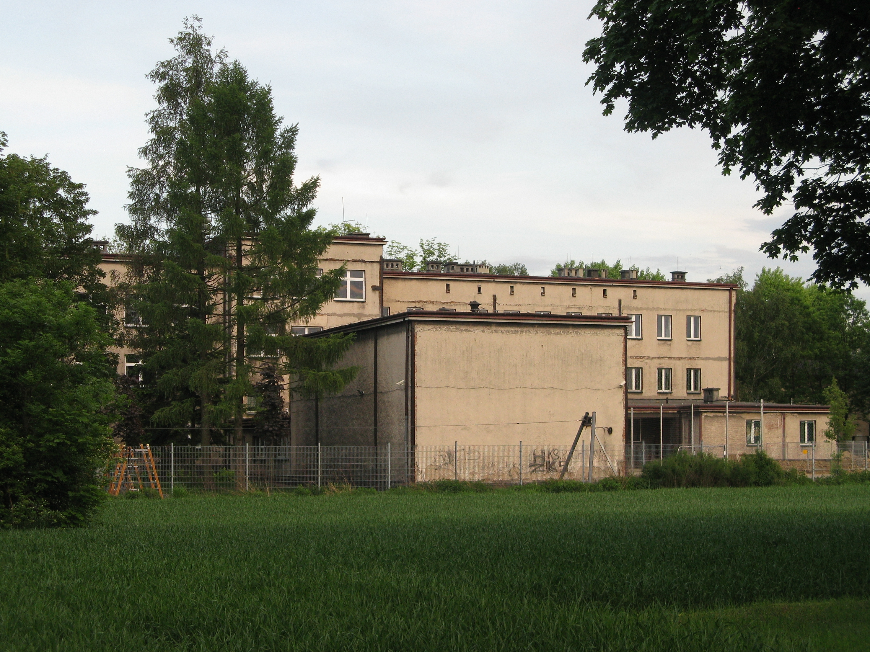 Budynek szkoły (Szkoła Podstawowa nr 25 im. Stanisława Hadyny) i biblioteki (Miejska Biblioteka Publiczna, filia nr 1 ) w Chorzowie-Maciejkowicach, ul. Główna 21.